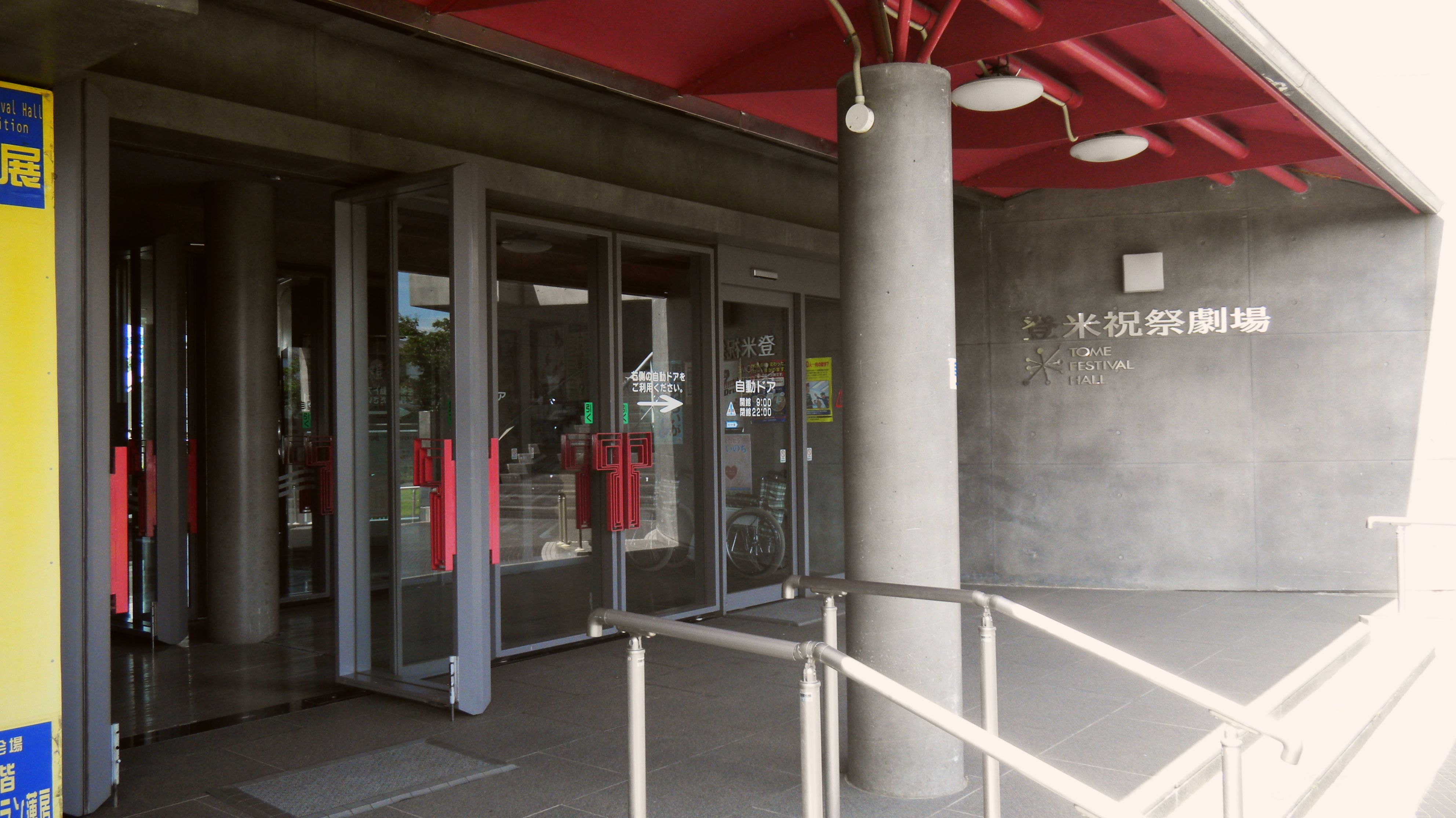 登米祝祭劇場の玄関